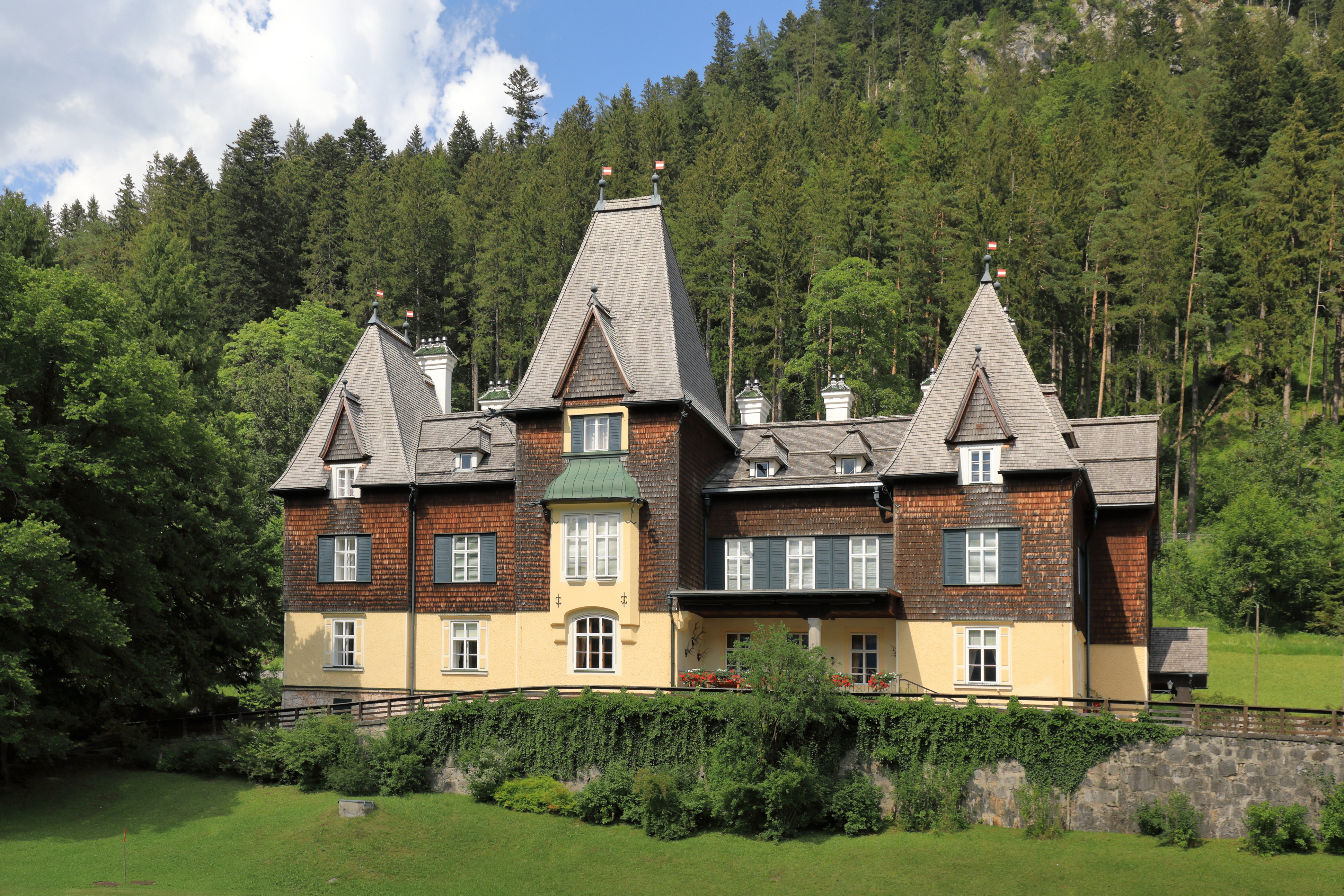 Das Jagdschloss bzw. die Präsidentenvilla in Mürzsteg, ein Ortsteil der steiermärkischen Marktgemeinde Neuberg an der Mürz.Das am Hang des Lanauberges zweigeschossiges, stark gegliedertes Gebäude wurde ursprünglich 1869 als kleines Jagdhaus für Kaiser Franz Josef errichtet und mehrfach um- bzw. ausgebaut (zuletzt 1903). Nach nach dem Ersten Weltkrieg wurde das Jagdschloss dem Kriegsgeschädigtenfonds übertragen, obwohl es nie Staatsbesitz sondern habsburgisches Privateigentum war. 1921 wurde das Schloss für öffentliche Besichtigungen freigegeben. Um den Nahrungsmittelmangel unmittelbar nach dem Ersten, aber auch nach dem Zweiten Weltkrieg zu lindern, wurde damals der Park der örtlichen Bevölkerung zum Gemüseanbau zur Verfügung gestellt. Einzelne Zimmer des Schlosses wurden an Feriengäste vermietet. In Jänner 1938 erfolgte die Restitution an Otto Habsburg, jedoch wurde es von den Nationalsozialisten wieder beschlagnahmt und dient seit 1947 als Sommersitz der österreichischen Bundespräsidenten.